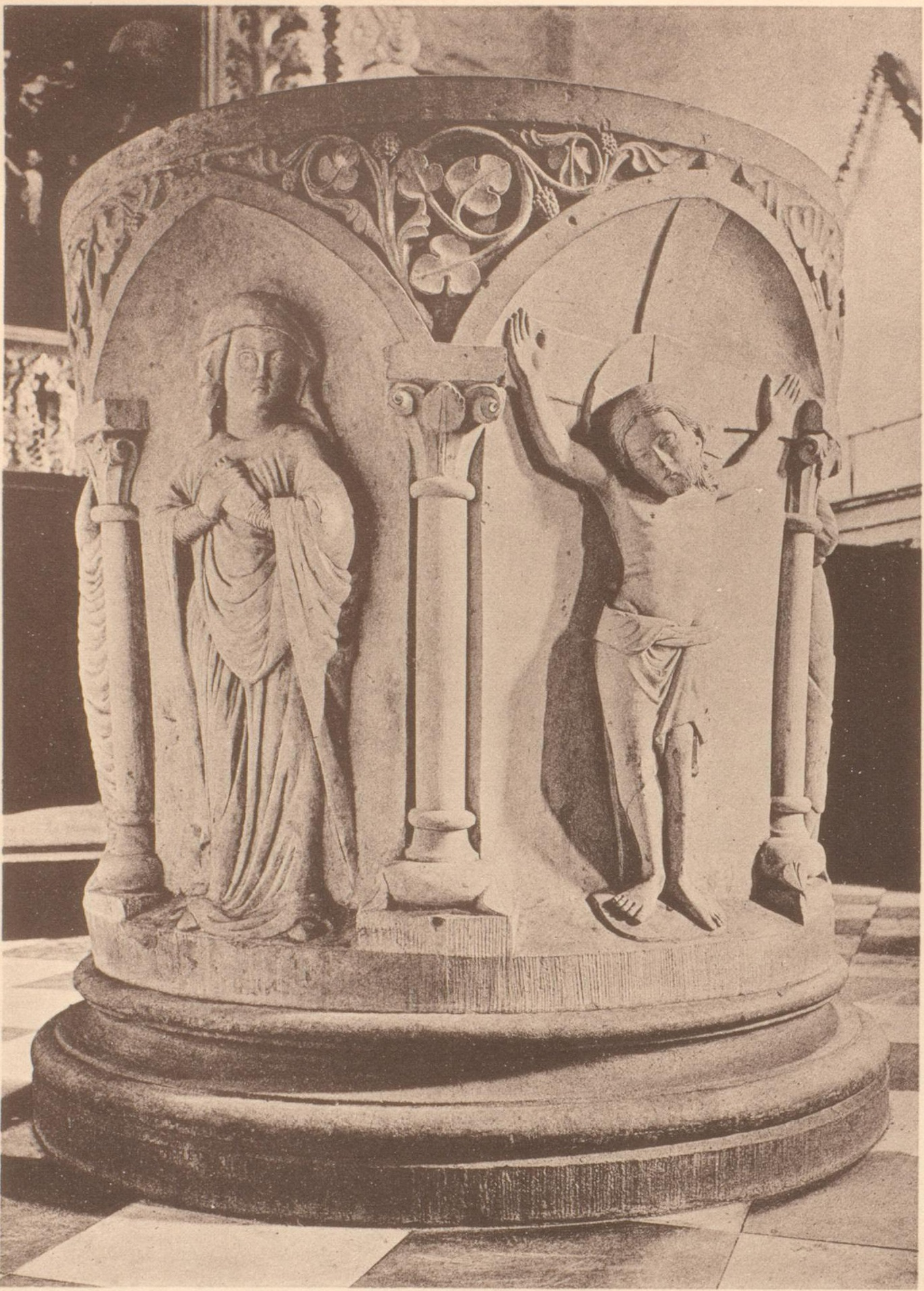 Rückseite des romanischen Taufsteins der Johann Baptistkirche in Brechten um 1890